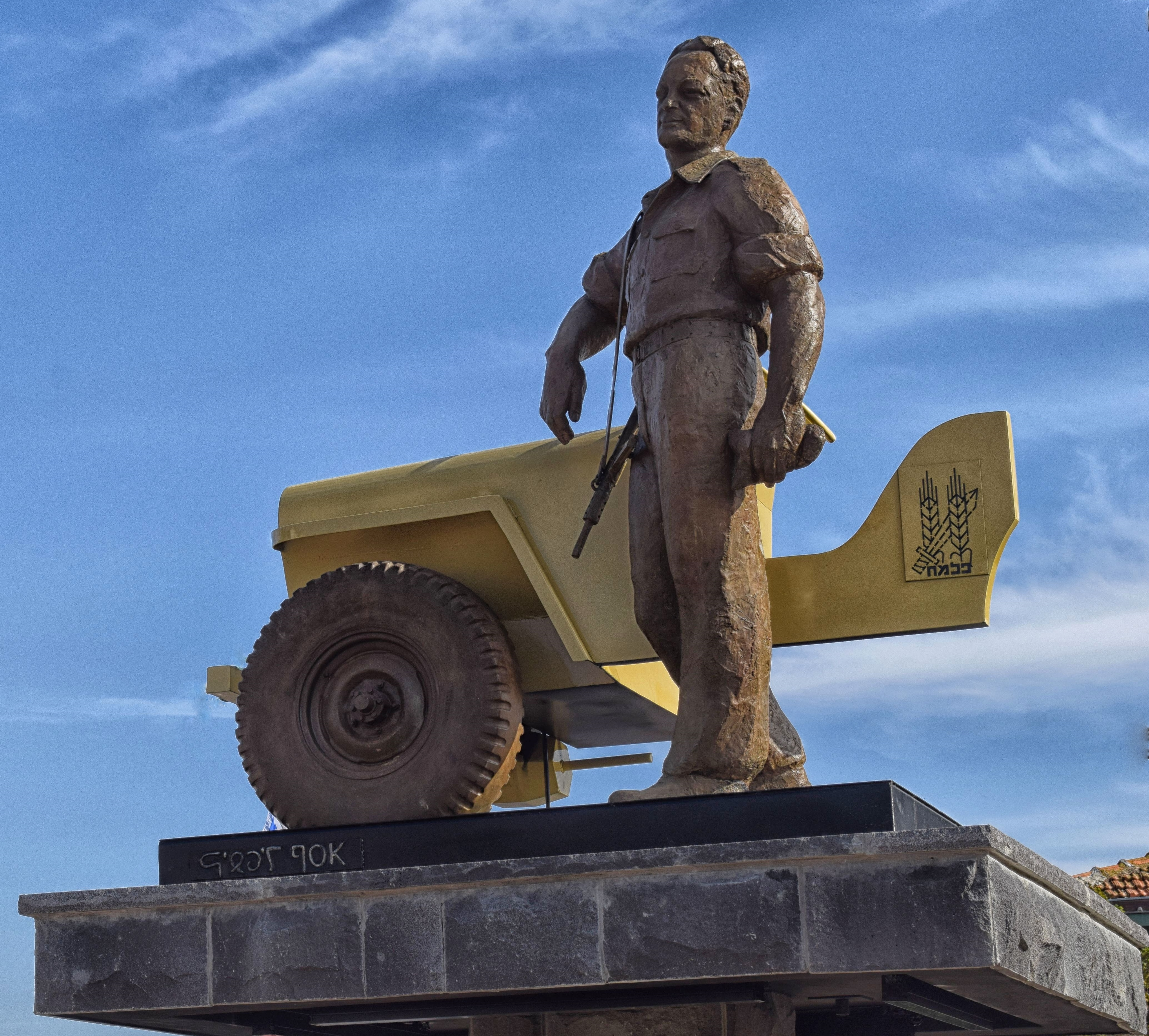 פסל "יגאל אלון"- מוצב בכיכר "יגאל אלון" בכפר תבור